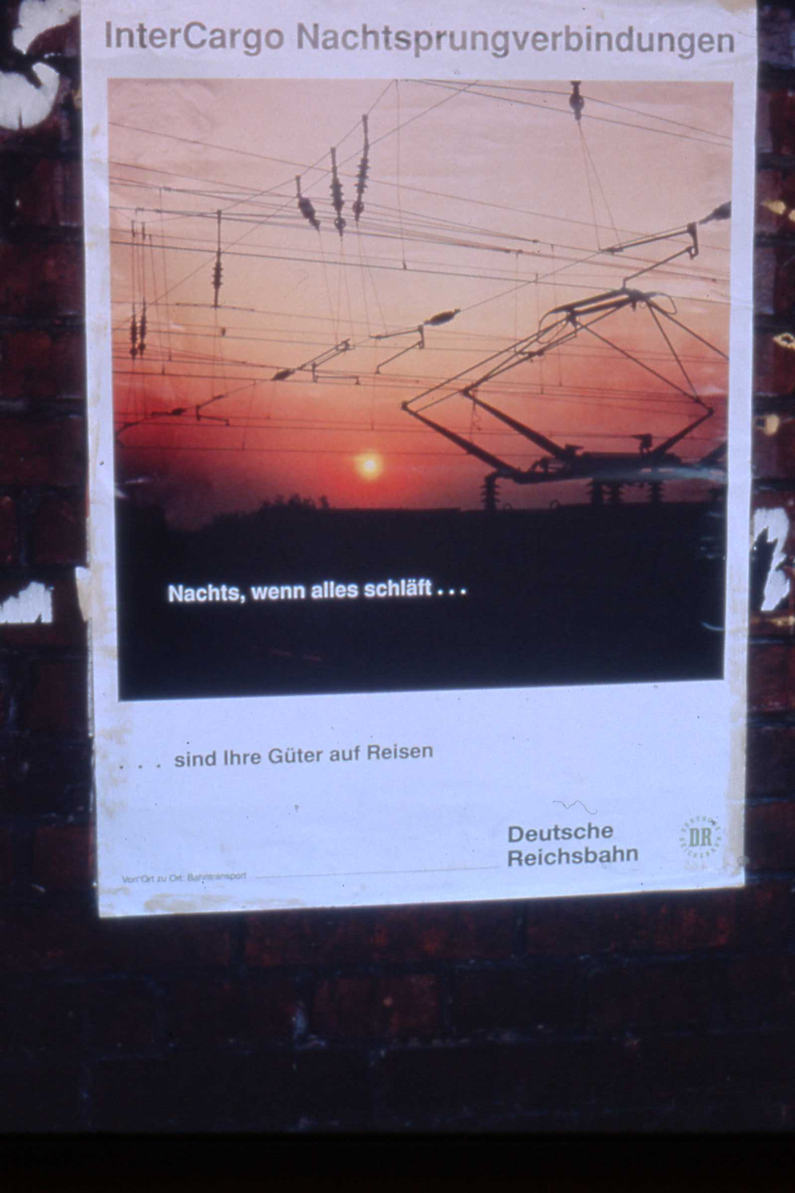 Deutsche Reichsbahn InterCargo advertisment August 1991